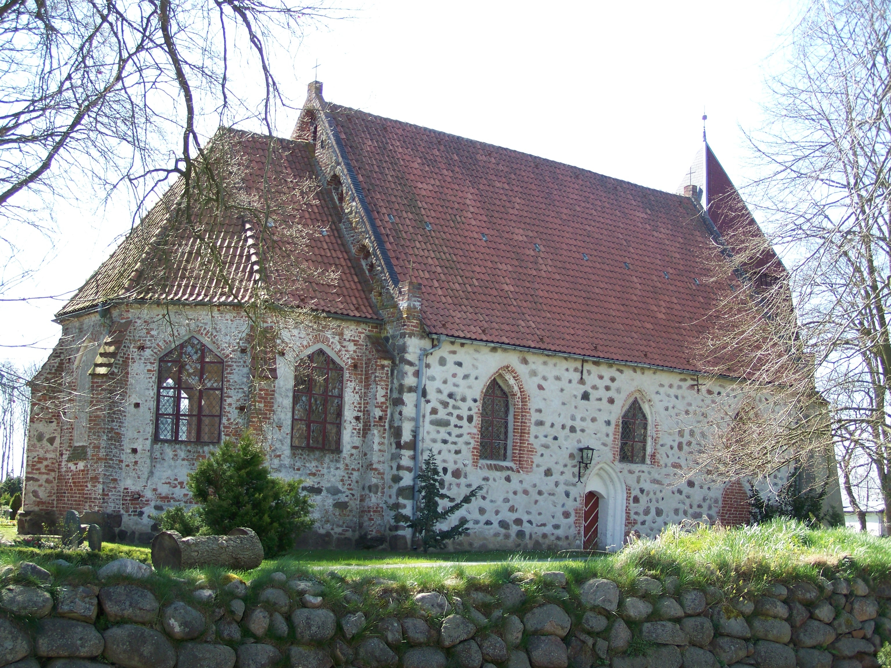 Elmenhorst, Kirche - Ansicht von der Straße (2008-04-20)